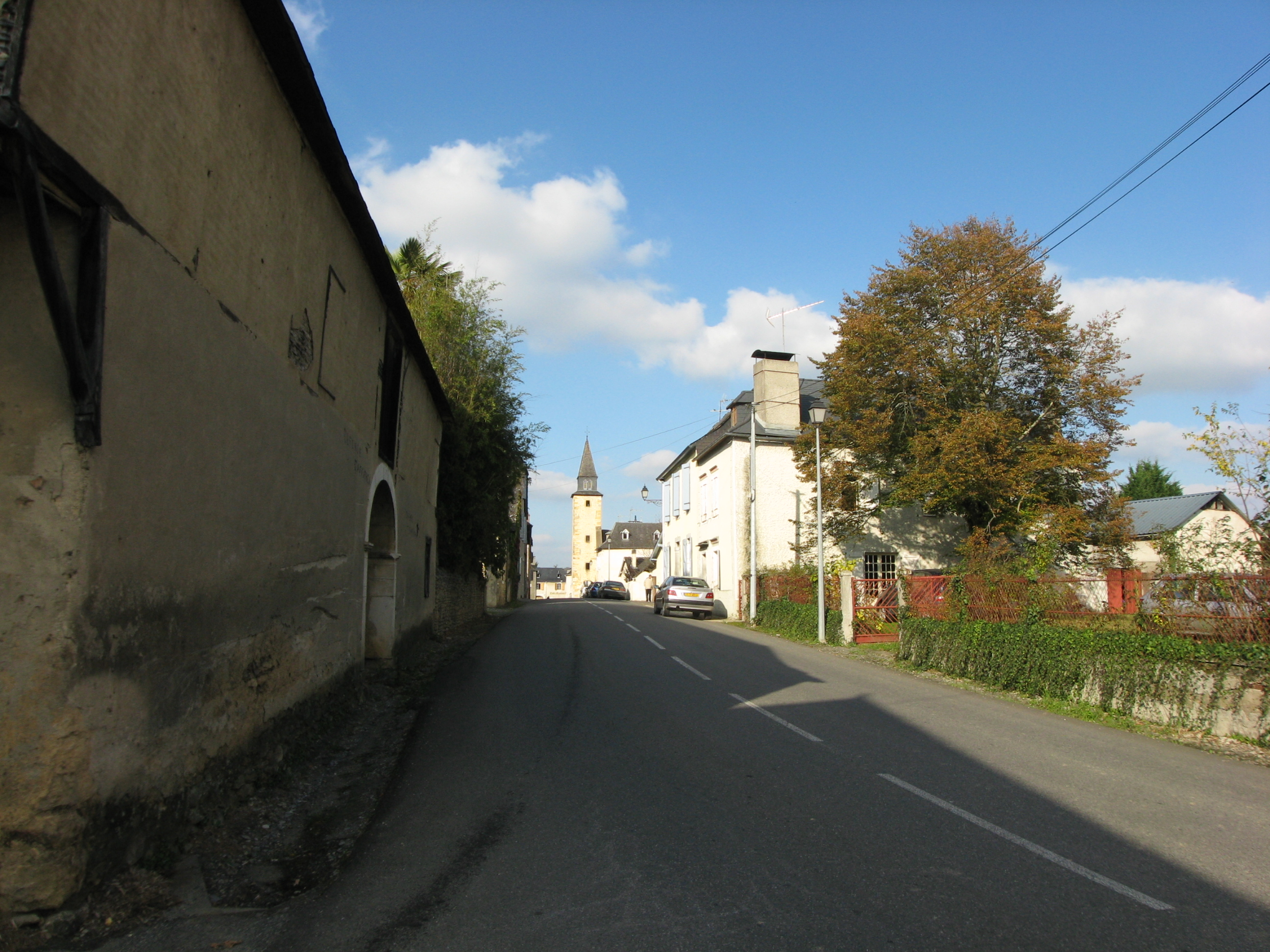 Vue de la rue principale de Cardesse (Pyrénées Atlantiques) Pyrénées).